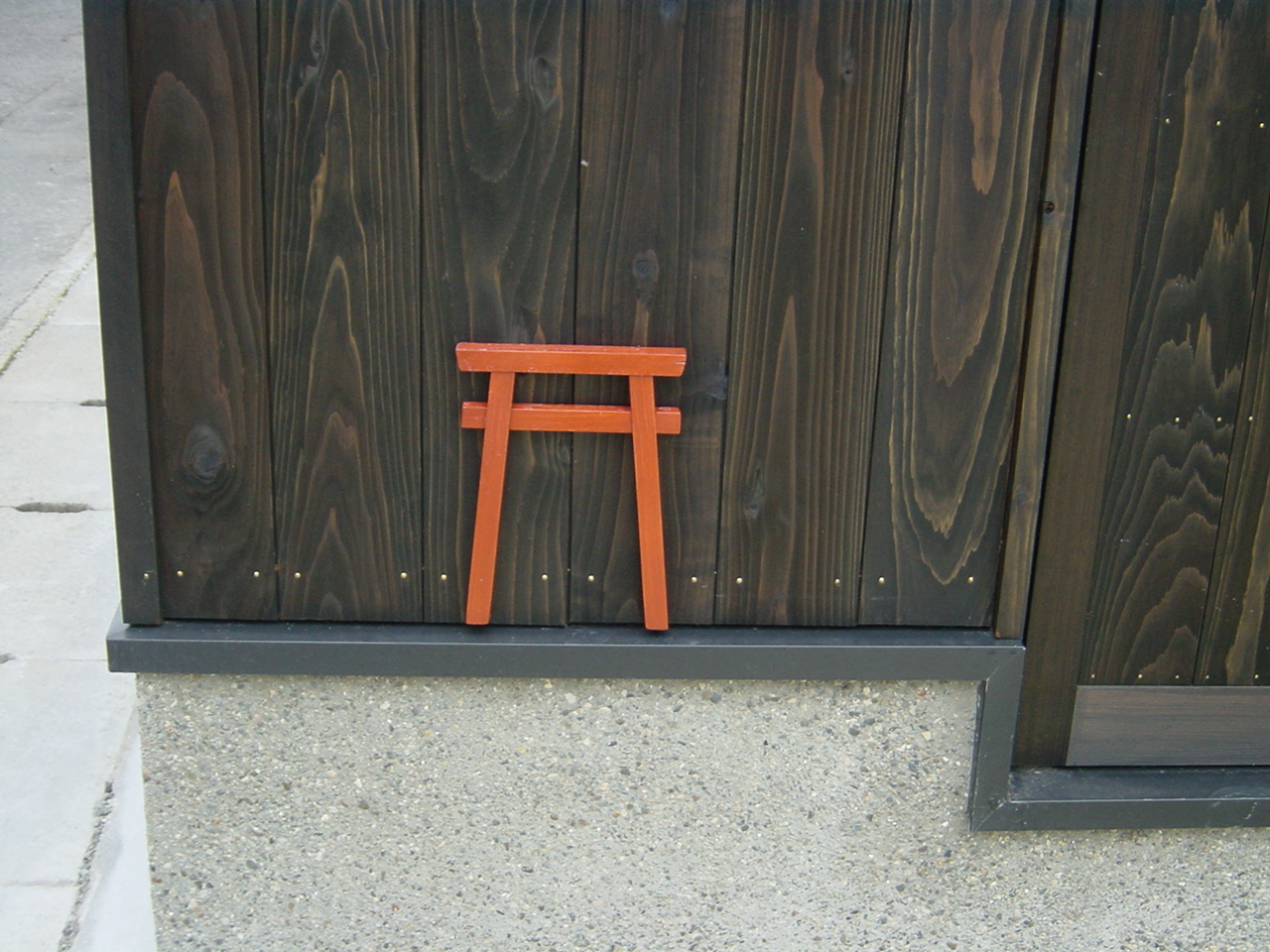 小便避けの鳥居。2004年8月、大分県竹田市にて撮影。